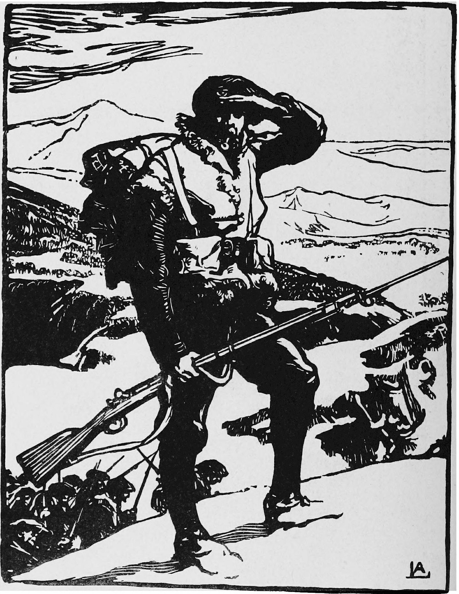 Chasseur alpin regardant la plaine du rhin